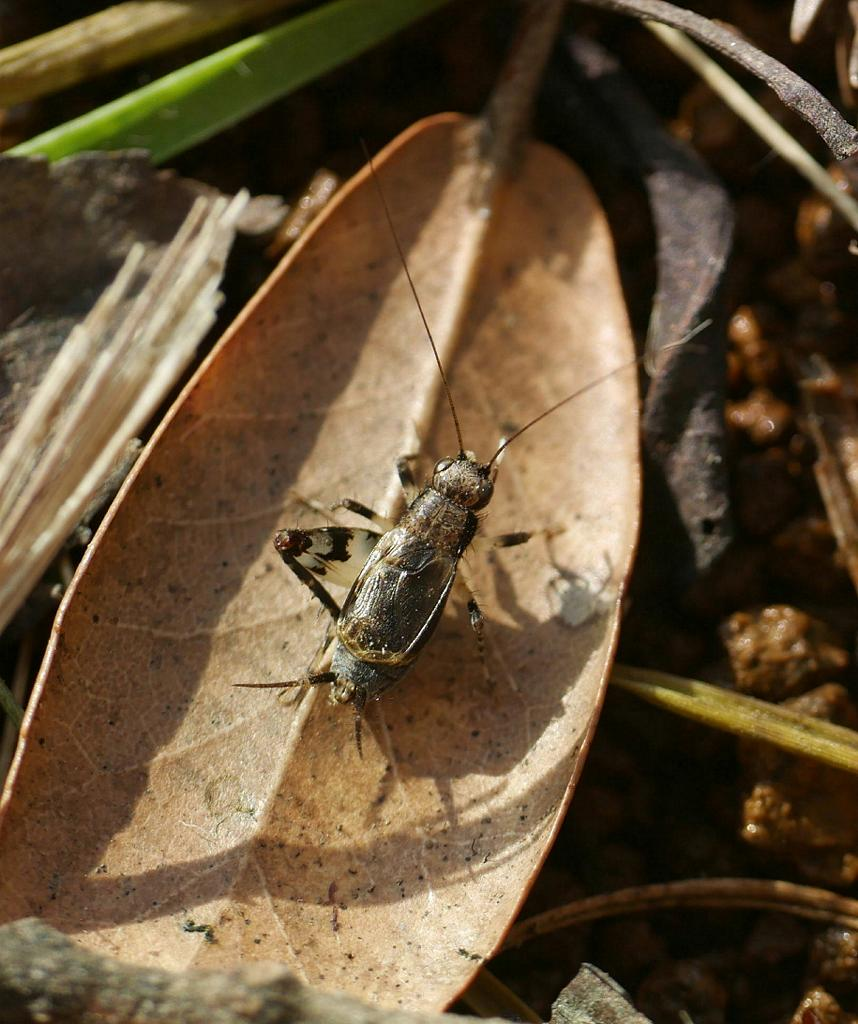 Dianemobius nigrofasciatus：マダラスズ 2018/10/03 和歌山県田辺市：Tanabe City. Wakayama Pref. Japan